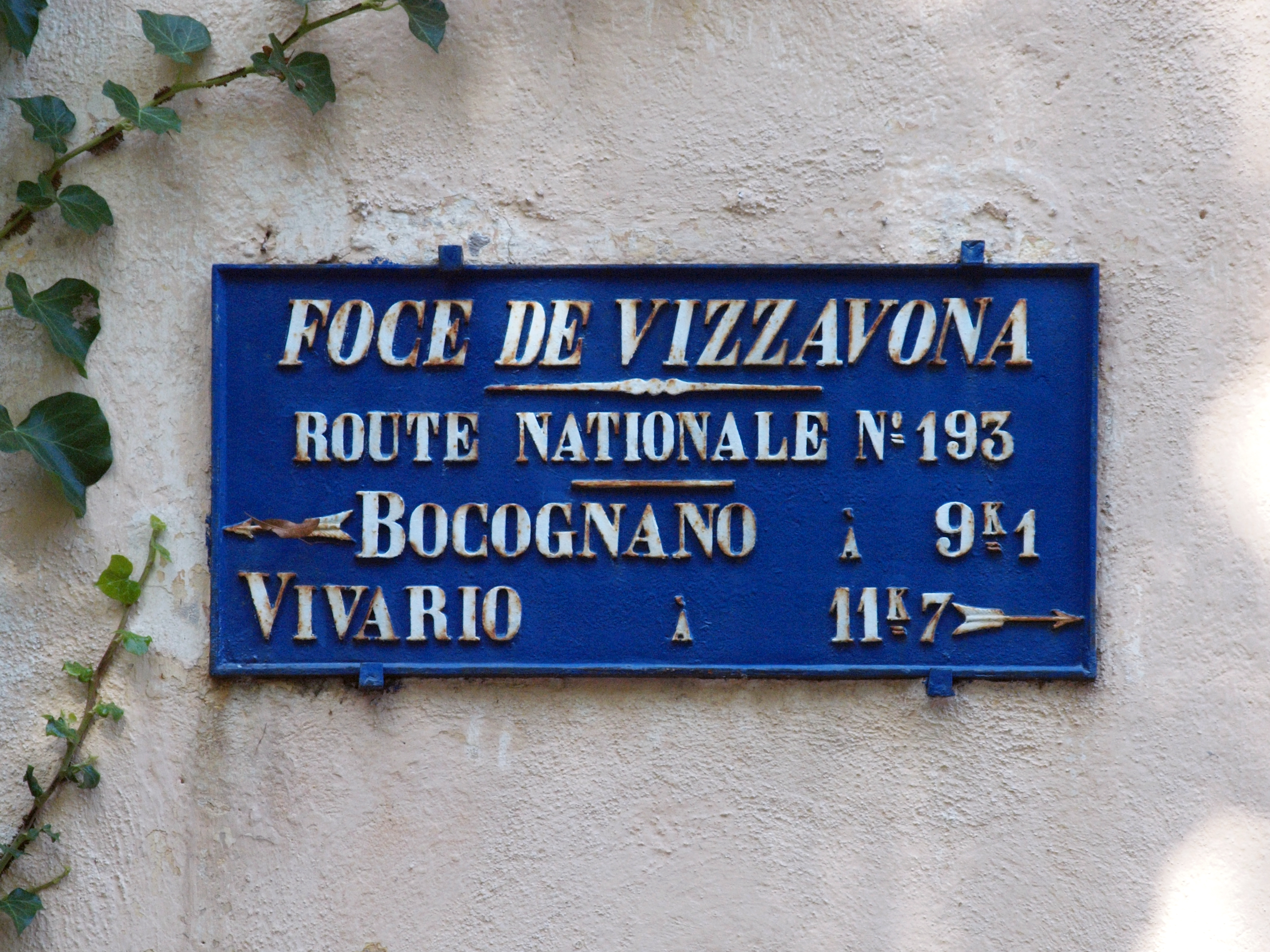 Vivario, Centre Corse - Ancienne signalisation sur l'ancienne portion de la Route nationale 197 au col de Vizzavona